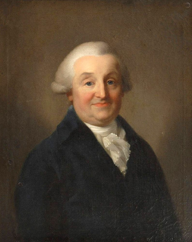 Der Leipziger Bankier Eberhard Heinrich Löhr, Ölgemälde von Johann Friedrich August Tischbein